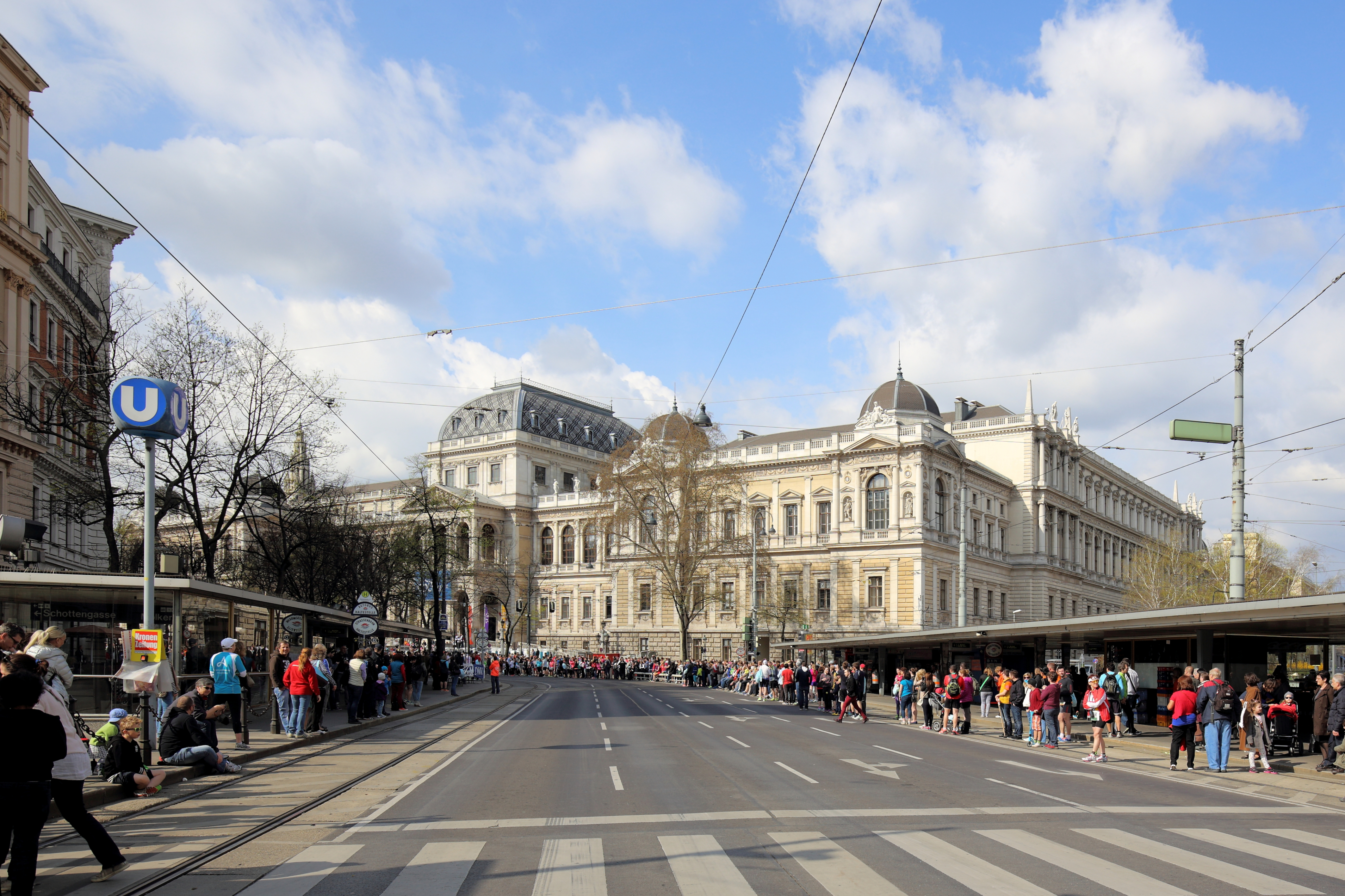 Nordostansicht (vom Schottentor) des Hauptgebäudes der Universität Wien am Universitätsring in der österreichischen Bundeshaupstadt Wien. Das Universitätsgebäude wurde von 1877 bis 1884 nach Plänen des Architekten Heinrich von Ferstel errichtet.